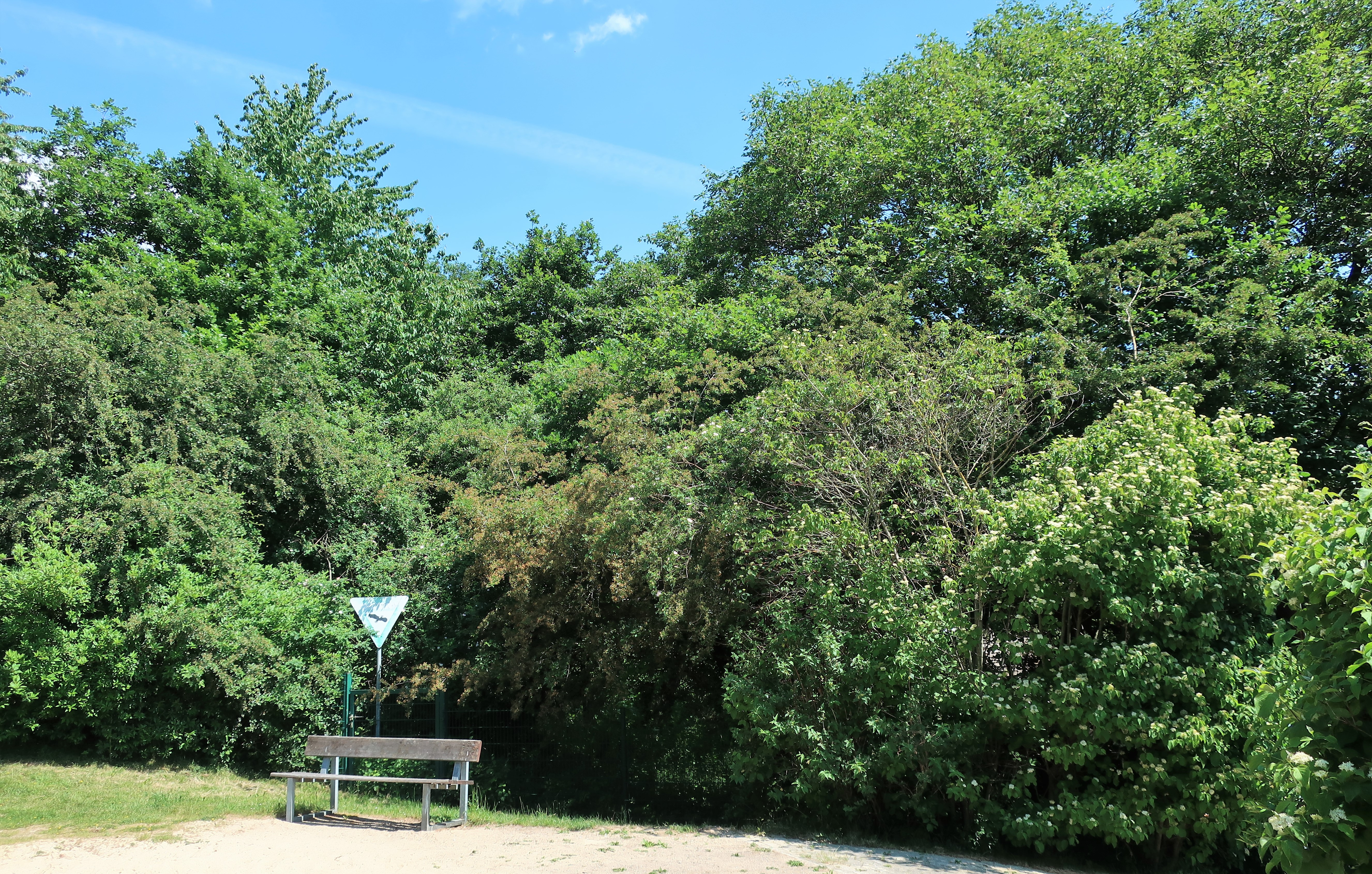 Geschützter Landschaftsbestandteil 1.4.2.45 „Stillgewässer Kuhlerkamp“ in Hagen, westlich der Margaretenstraße. In dem kleinen Bereich befindet sich ein Stillgewässer.